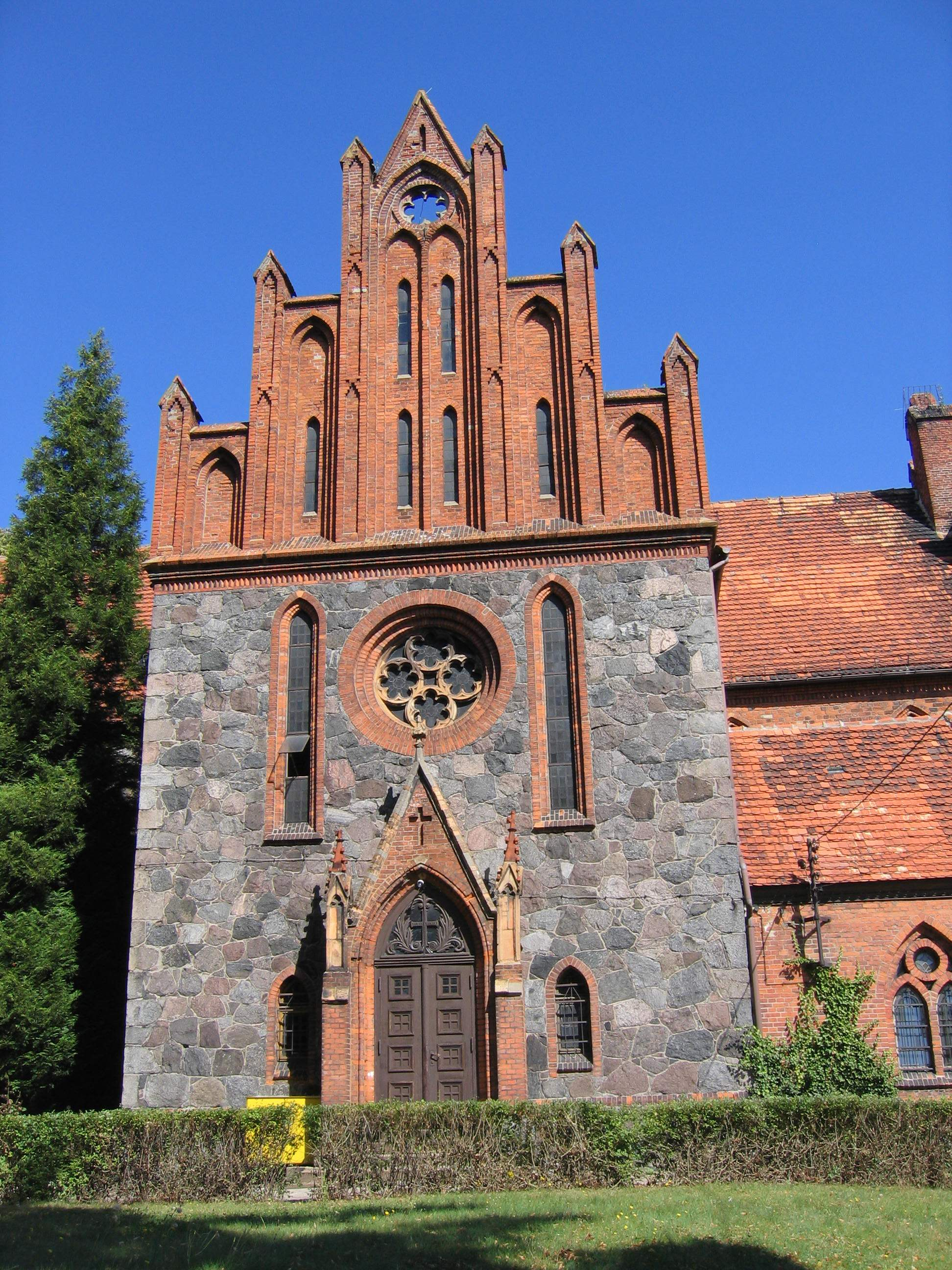 Lipiany - kościół parafialny p.w. Wniebowzięcia NMP